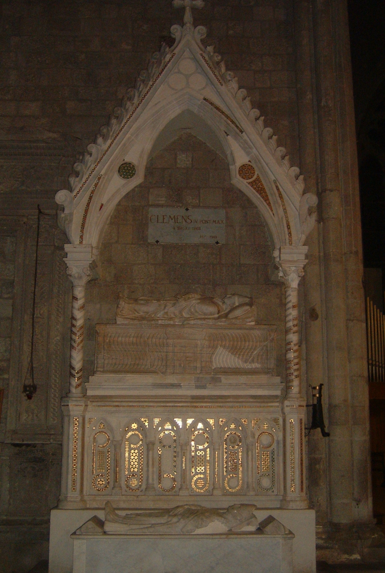 Monumento funerario del papa Clemente IV conservato a Viterbo nella Basilica di San Francesco Foto scattata da me il 25 gennaio 2009